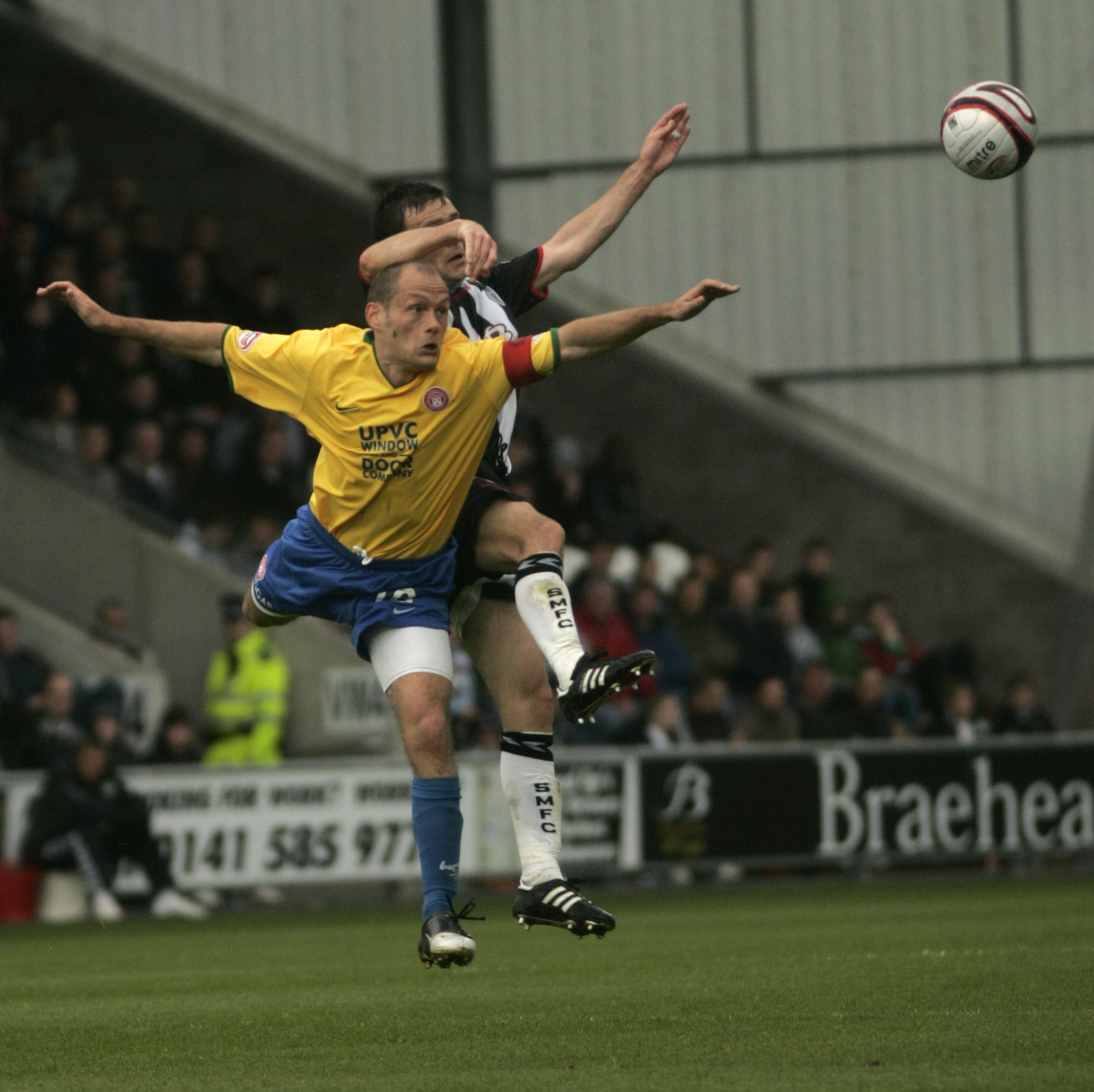 _I7Y7720